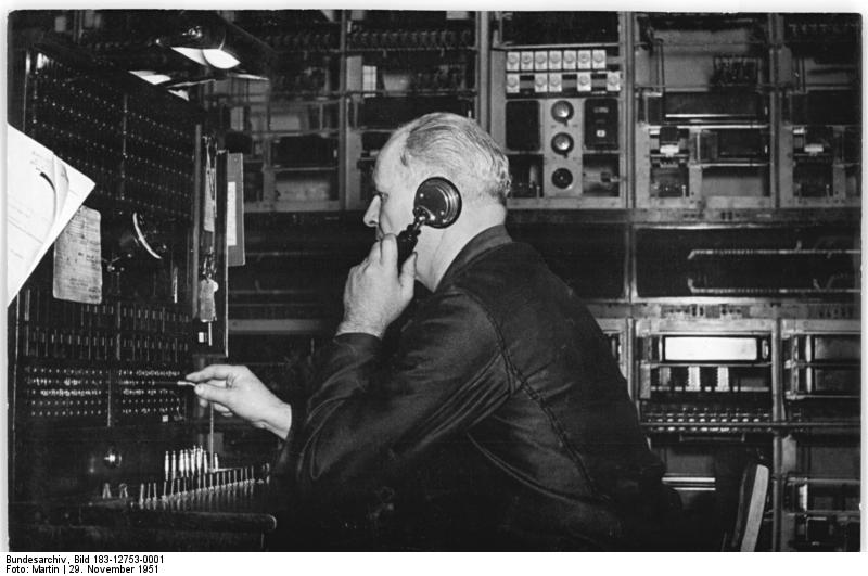 Illus Martin 29.11.51 75 Jahre Rohrpost in Berlin Am 1. Dezember 1951 besteht die Berliner Rohrpost 75 Jahre. Die Zentrale der Berliner Rohrpost und zugleich modernste Schnellrohrpostanlage Europas ist das Haupttelegrafenamt in der Oranienburger Strasse. Hier trifft die Post von den jeweiligen Postämtern ein und wird zu den jeweiligen Bestimmungsämtern weiterbefördert. UBz: Die Telefonzentrale des HTA mit den direkten Verbindungen zu allen Rohrpostämtern